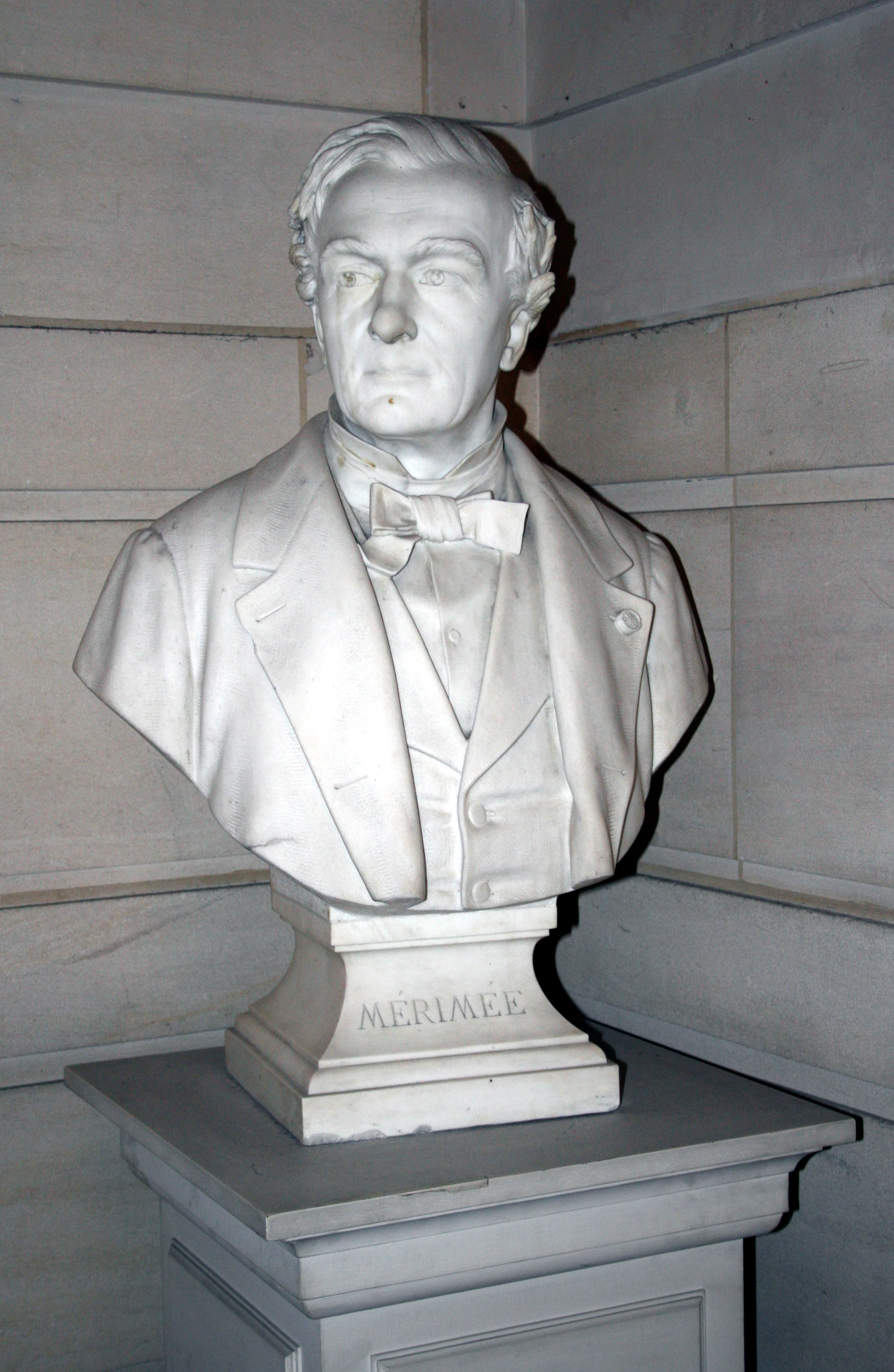 Buste de Prosper Mérimée